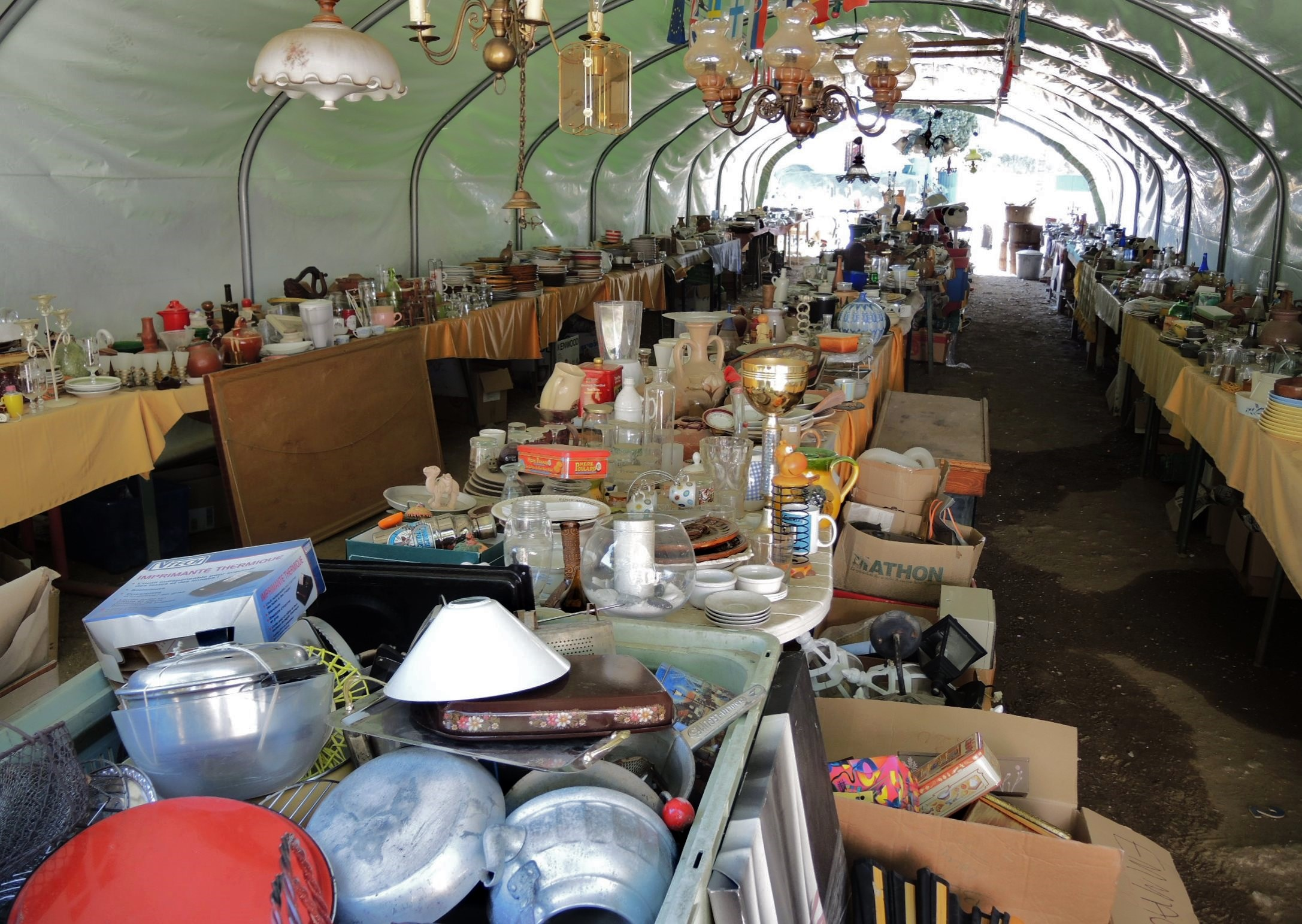 Bogy détail